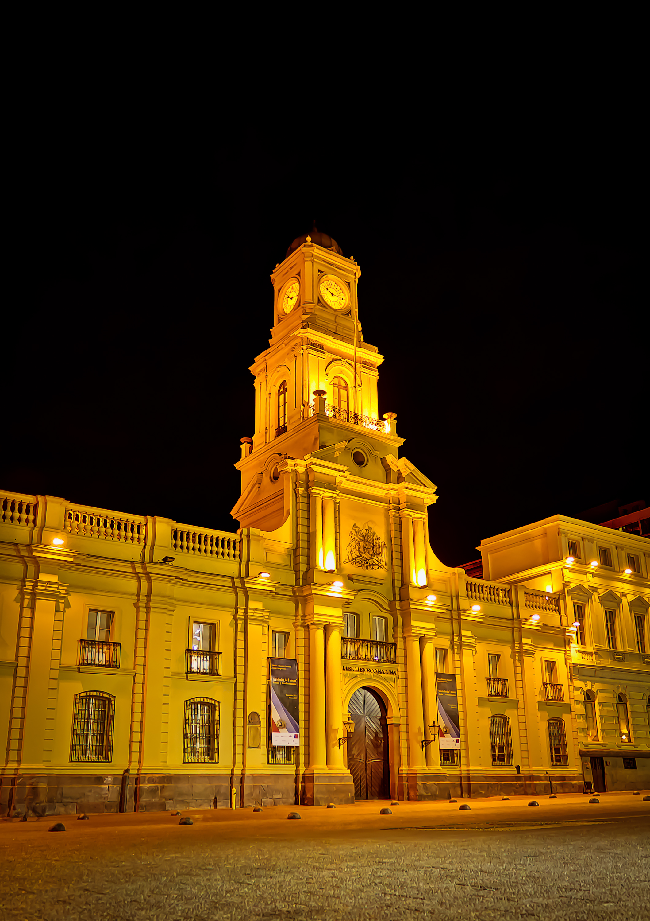 Museo Histórico Nacional en la noche.